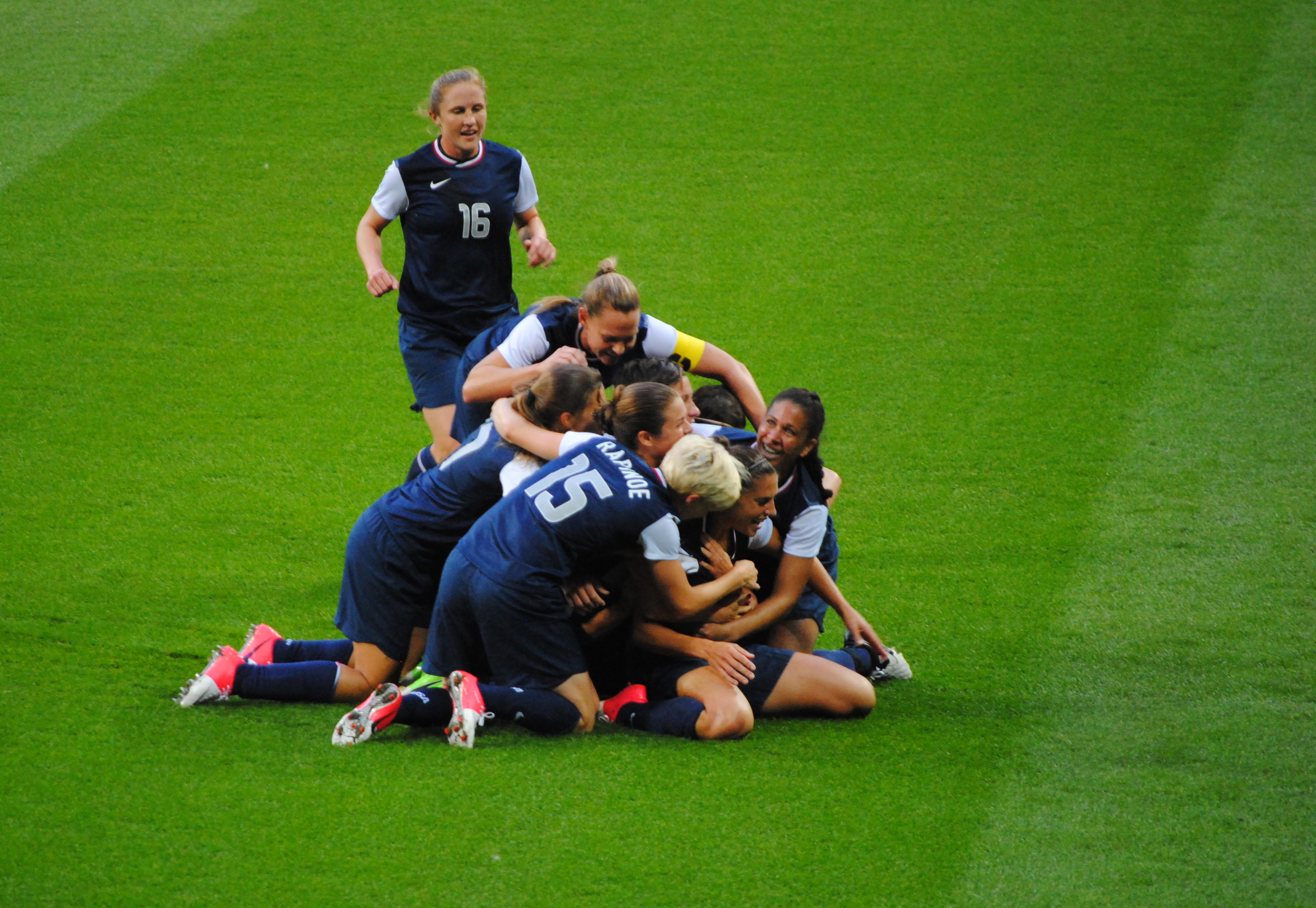 USA vs Japan